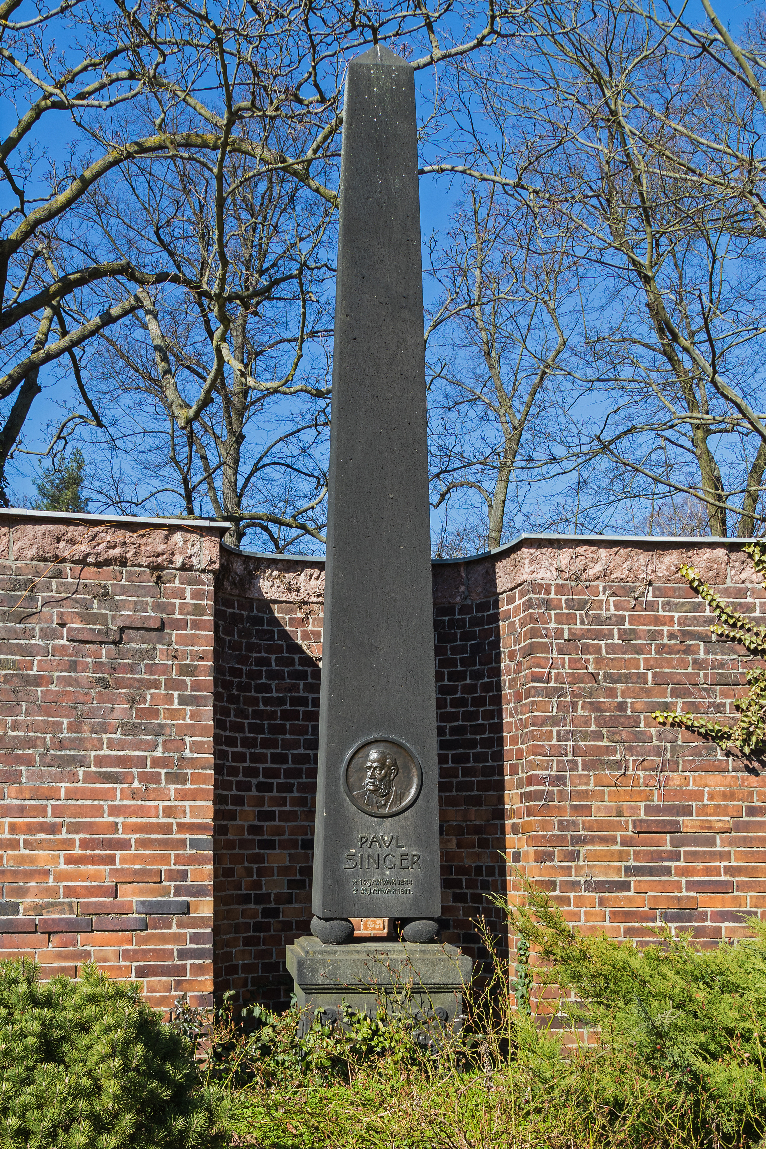 Zentralfriedhof Friedrichsfelde, Berlin-Lichtenberg. Gedenkstätte der Sozialisten, Grab von Paul Singer.